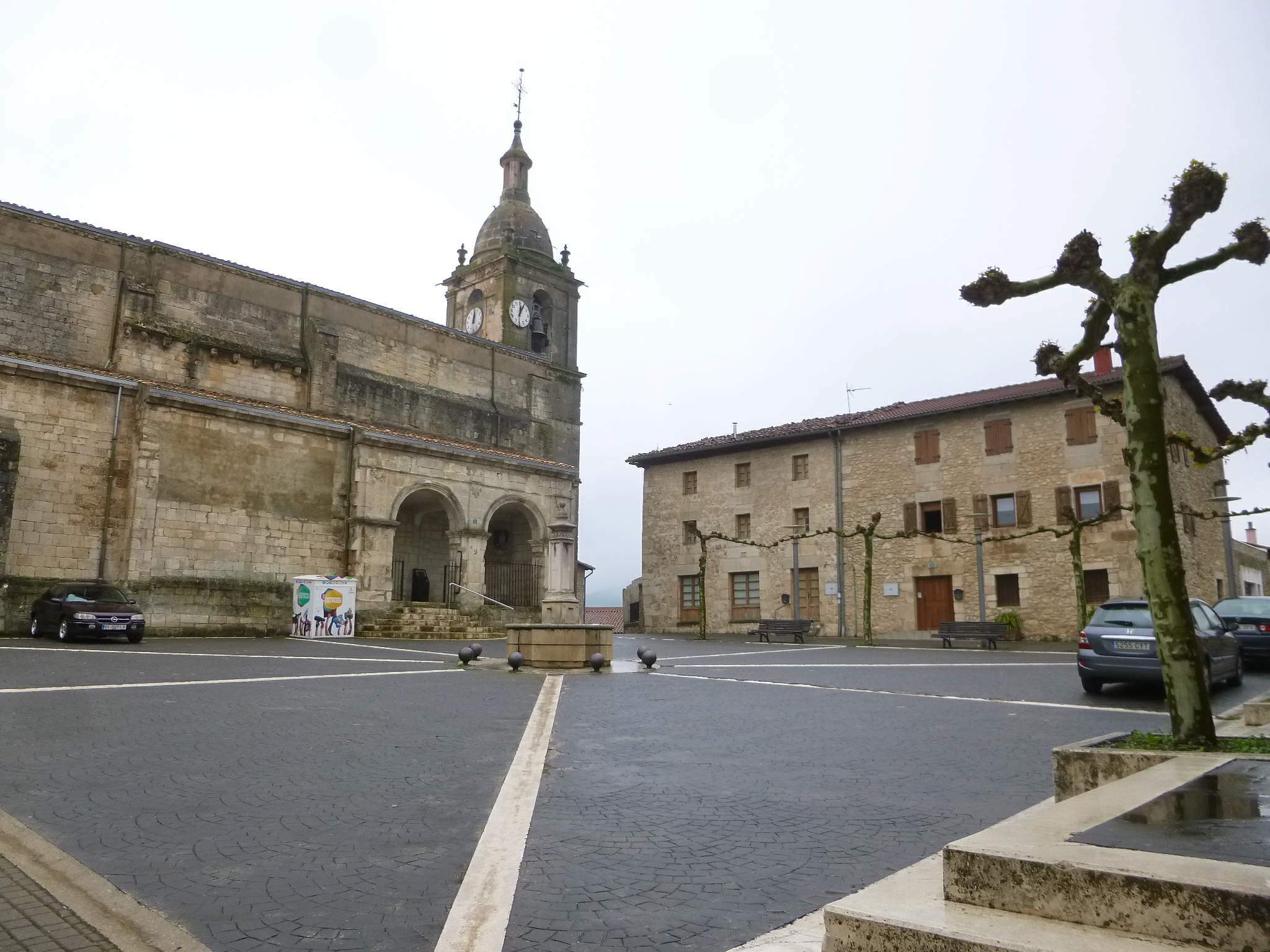 Peñacerrada (Álava)